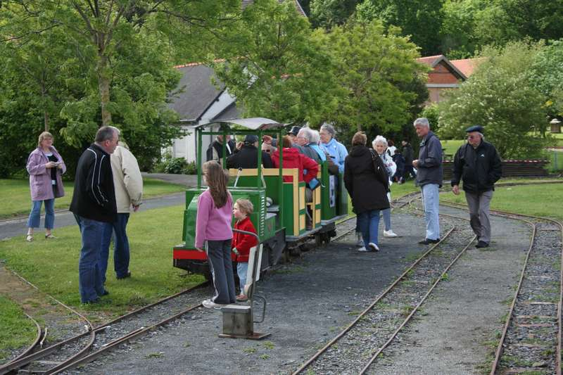 Le Tramway de Boutdeville - train en voie de 40 cm construit par l'Association des Chemins de Fer des Côtes-du-Nord